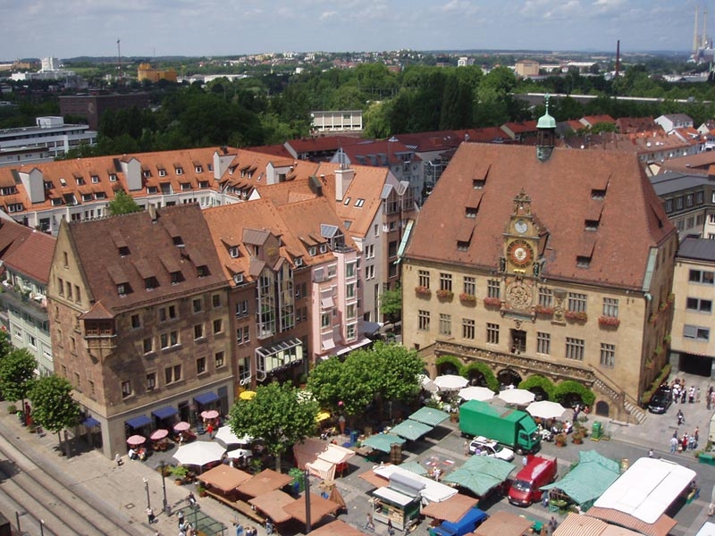 Der Marktplatz in Heilbronn mit dem von einer Kunstuhr geschmückten Rathaus (rechts) sowie dem Käthchenhof mit Käthchenhaus (links). Im Hintergrund ist das heilbronner Wasserkraftwerk zu erkennen.